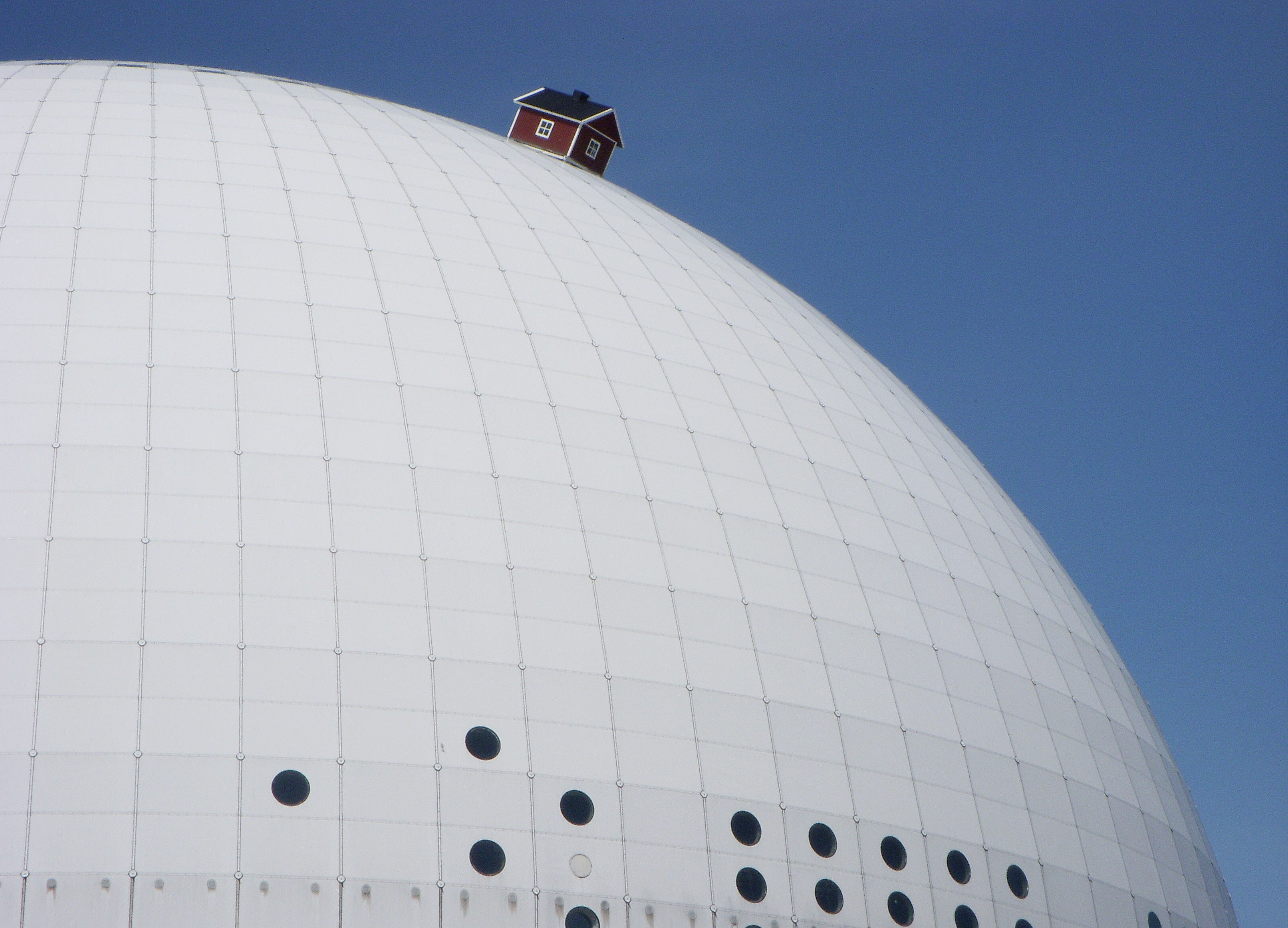 En röd liten stuga på Globen på 20 års jubileum 26 maj 2009 (ej fotomontage!)